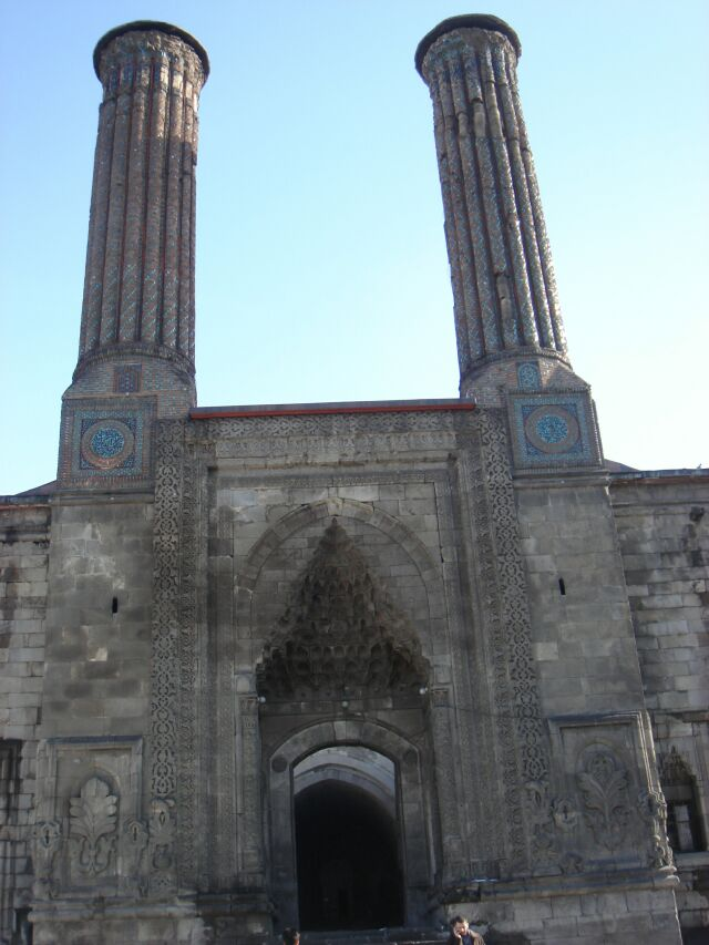 tarafımdan çekilmiş resimdir telif hakkı yoktur.